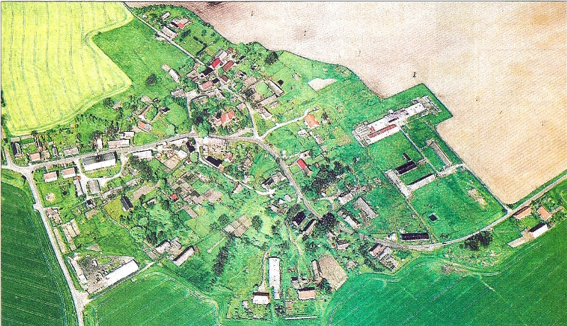 Luftaufnahme von Bargischow Category: Bargischow, Germany